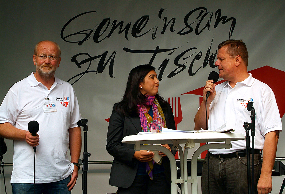 Zur Eröffnung der Solidaritätstafel, 2012 unter dem Motto "Gemeinsam zu Tisch", sprachen auf der Bühne am Schillerdenkmal in der Georgstraße (von rechts) Dr. Hans-Jürgen Marcus, Caritas-Direktor und Vorstandsvorsitzender vom Caritasverband für die Diözese Hildesheim e.V., Aygül Özkan, Sozialministerin von Niedersachsen und Schirmherrin der Veranstaltung, sowie Dr. Dr. Christoph Künkel, Abteilungsleiter Diakonie im Landeskirchenamt der Ev.-luth. Landeskirche Hannovers und Direktor des Diakonischen Werkes der Evangelisch-lutherischen Landeskirche Hannovers e.V. ...